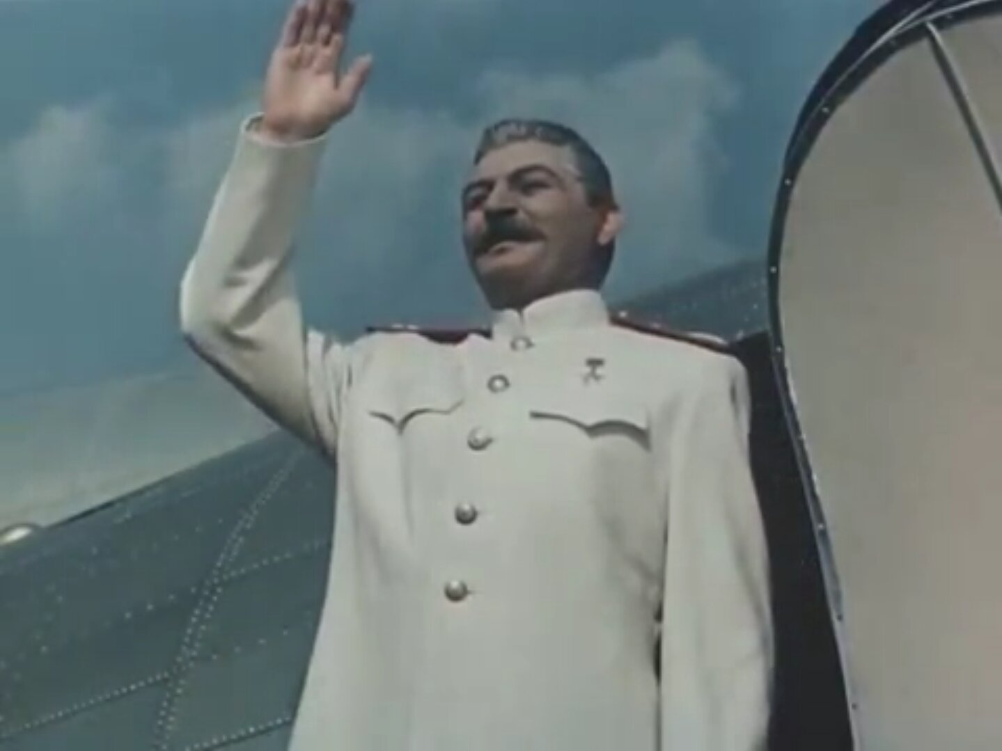 Кадр из фильма «Падение Берлина». Мосфильм, 1949.